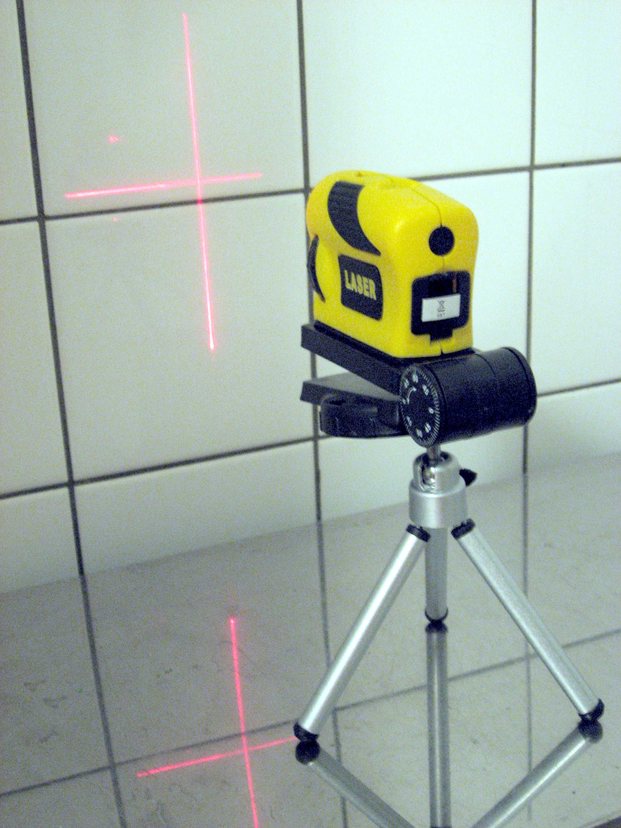 Modern waterpas